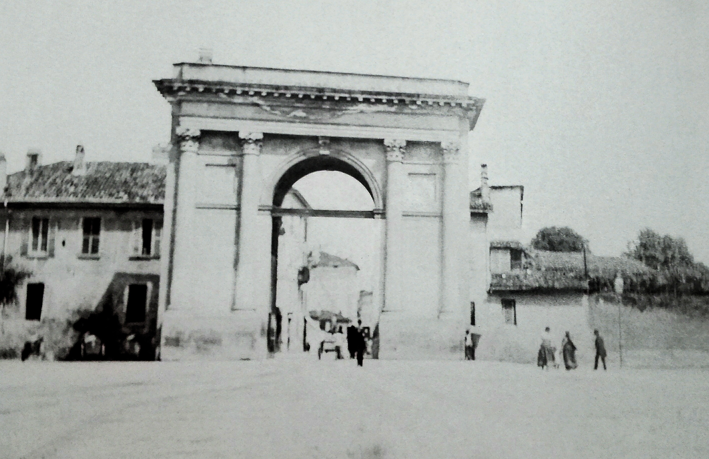 Porta Magenta ripresa nel 1885, anno di inizio delle demolizioni dei Bastioni Spagnoli nel tratto che va dal Castello a Porta Ticinese.